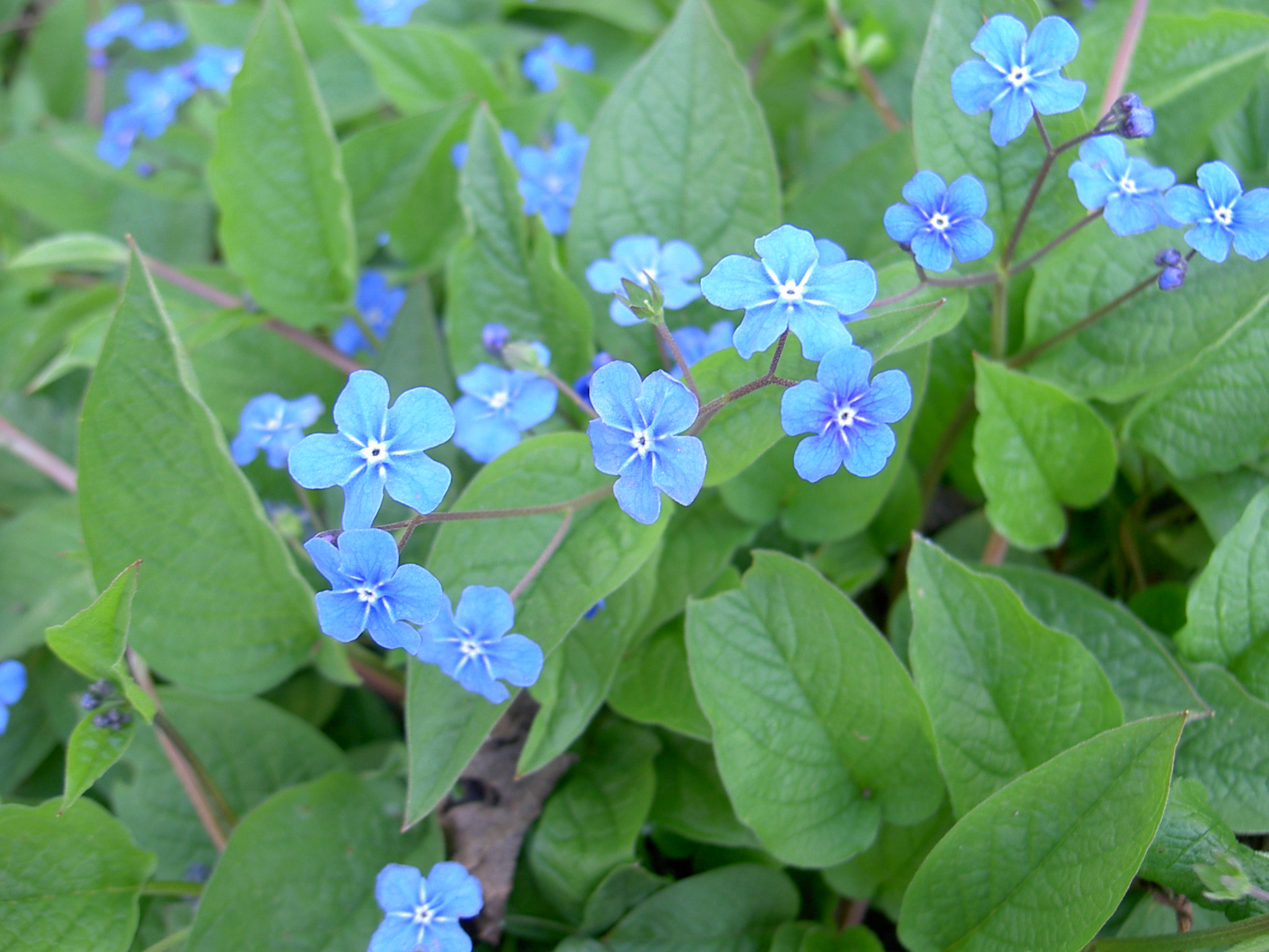 Omphalodes verna